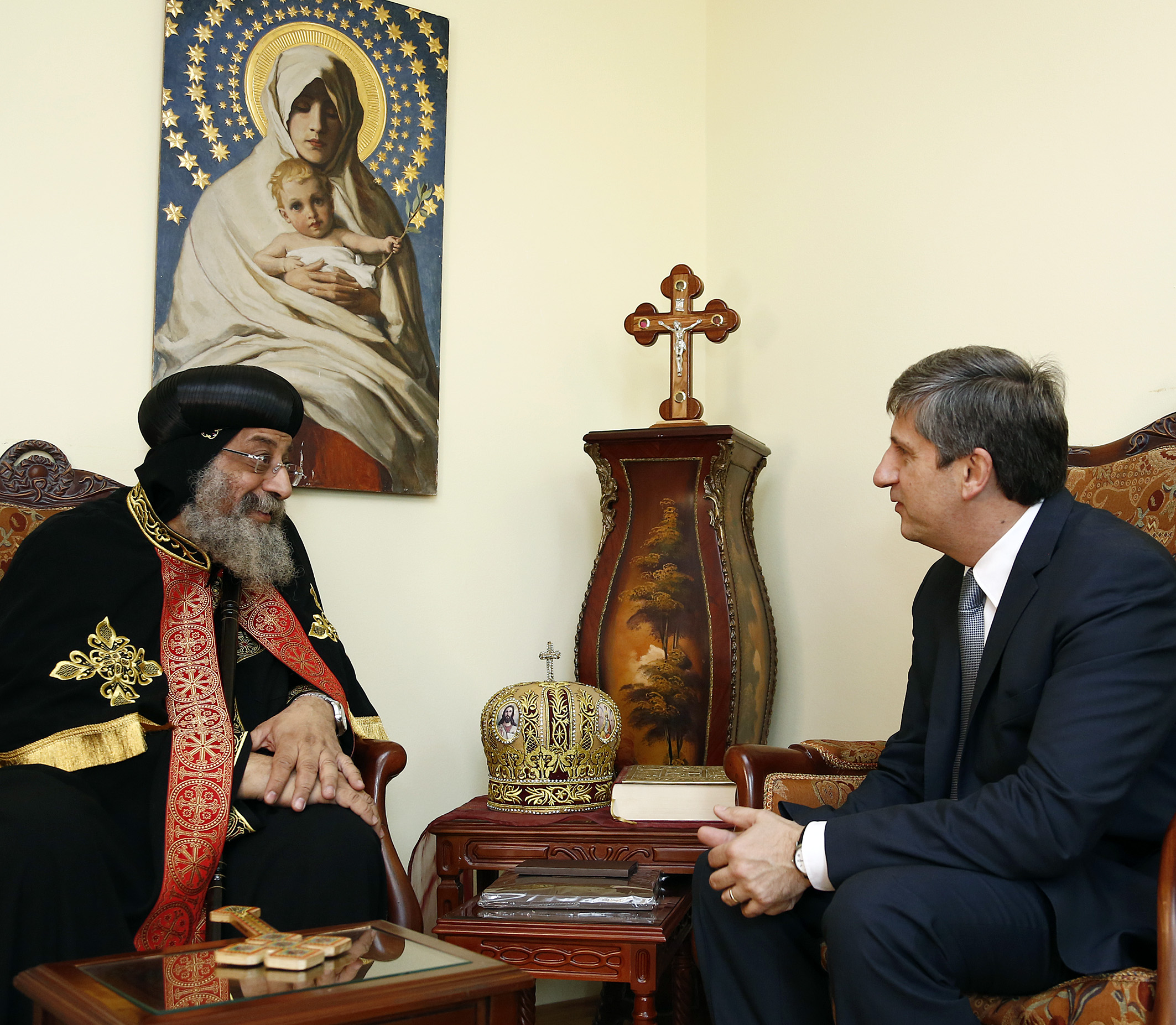 Vizekanzler und Außenminister Michael Spindelegger trifft das Oberhaupt der koptisch-orthodoxen Kirche, S.H. Papst-Patriarch Tawadros II, Wien, 03.06.2013, Foto: Dragan Tatic